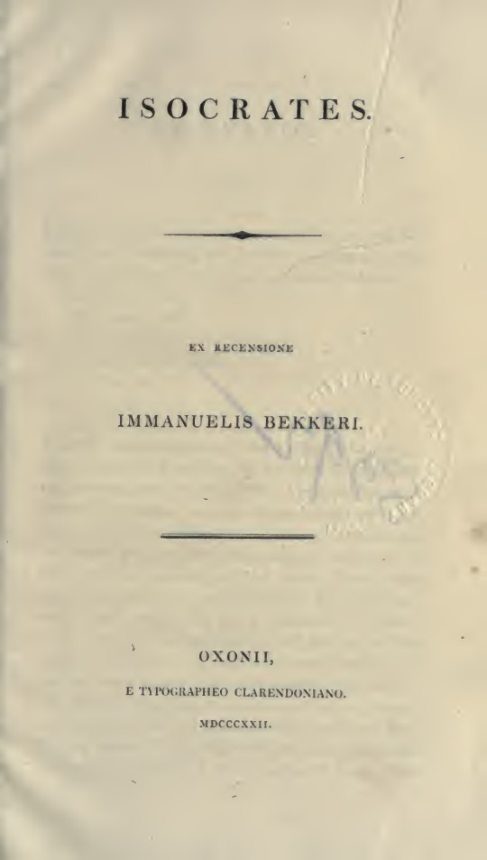 2: Isocrates. - Oxonii : E Typographeo Clarendoniano, 1822. - [2], IV, [2], 620 p. - C. a4, contenente l'Index orationum, montata in fondo al volume . Frontespizio